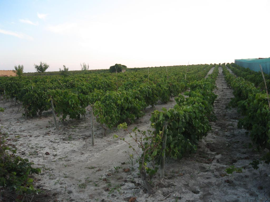 Viña en el pago de Miraflores en Sanlúcar de Barrameda